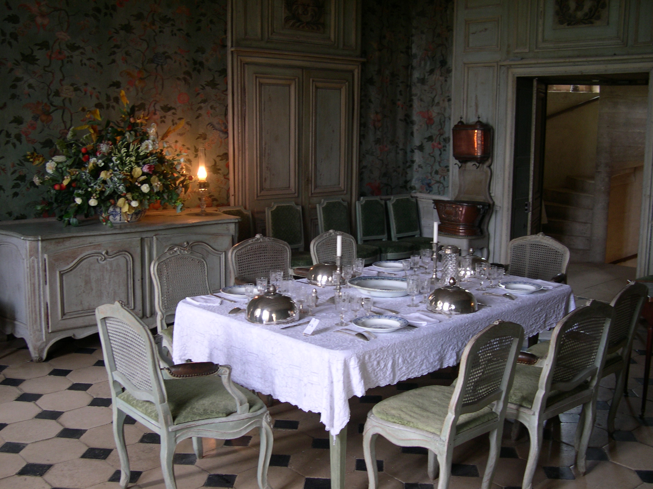 Schloss Talcy (Loir-et-Cher), Speisesaal